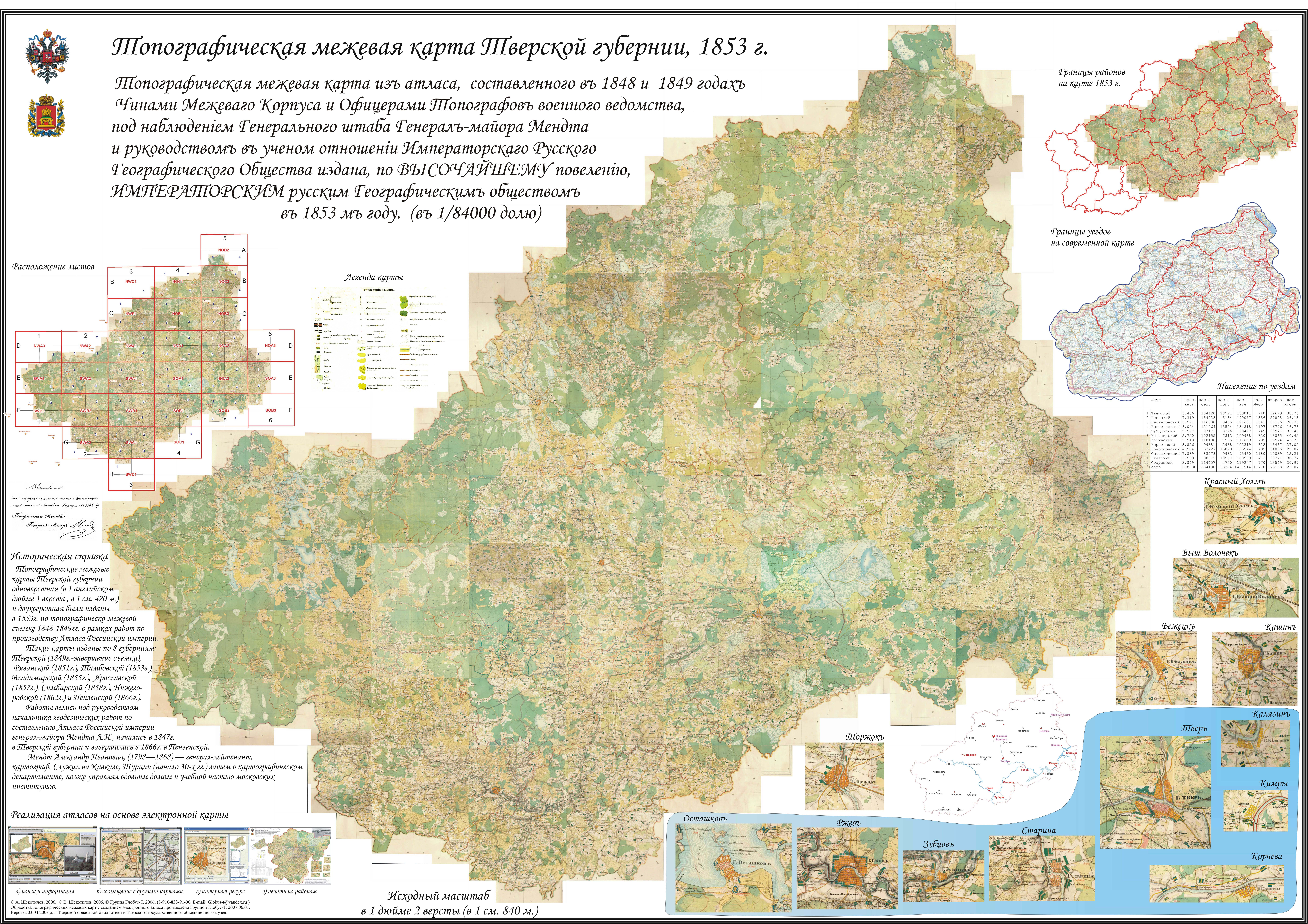 Карта-схема сделана на основе объединения листов двухверстной топографической межевой карты Тверской губернии 1853г., изданной под руководством Александра Ивановича Менде (Мендт). Детальный просмотр карты